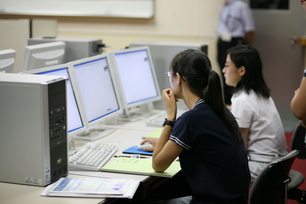 CG lab. picture